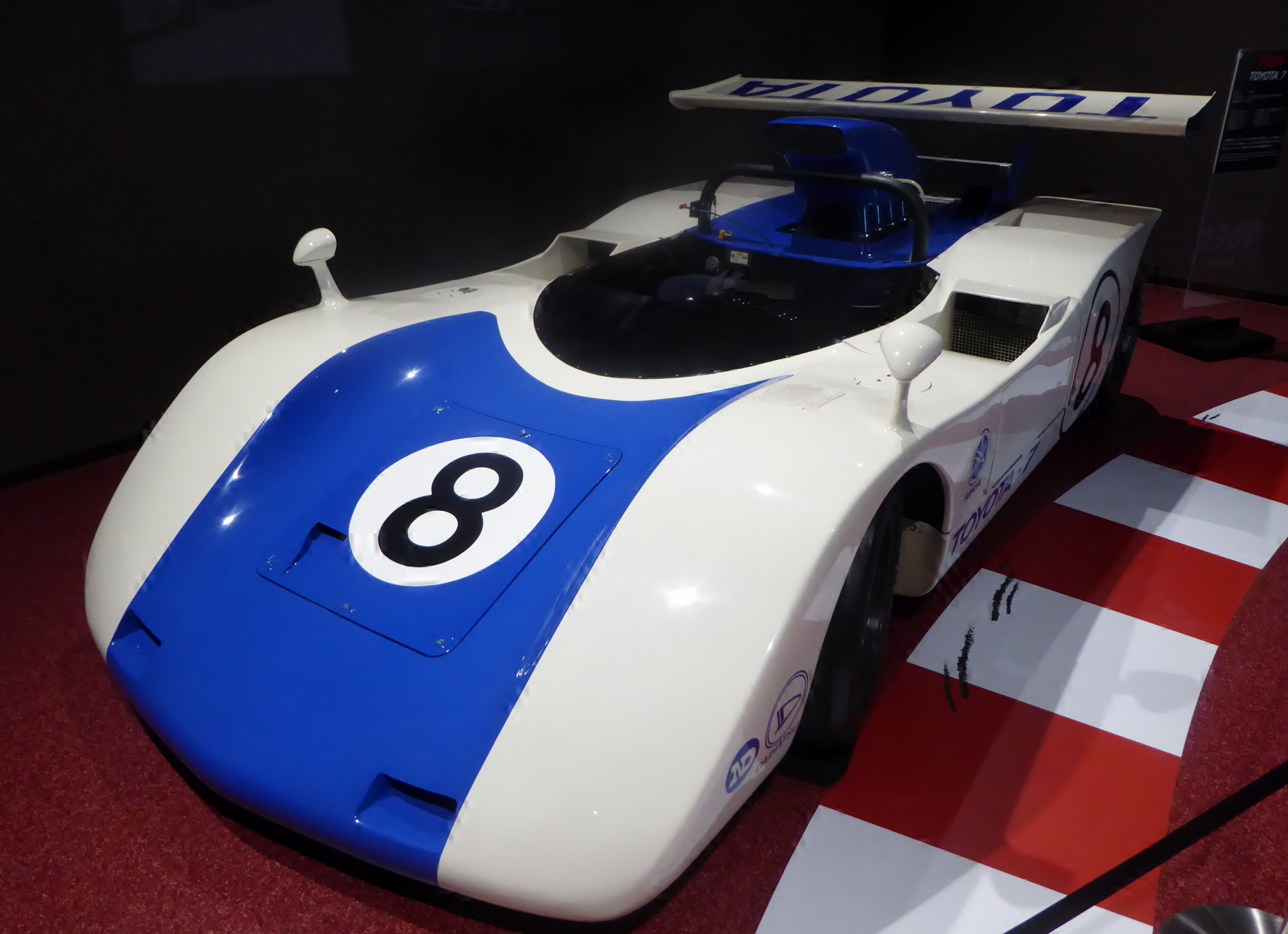 トヨタ・7をフロントから撮影。